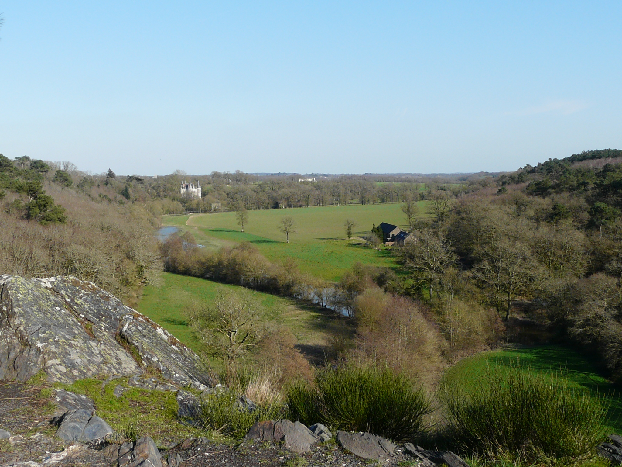 Le Château de Juzet et la vallée du Don vus du rocher des amoureux.